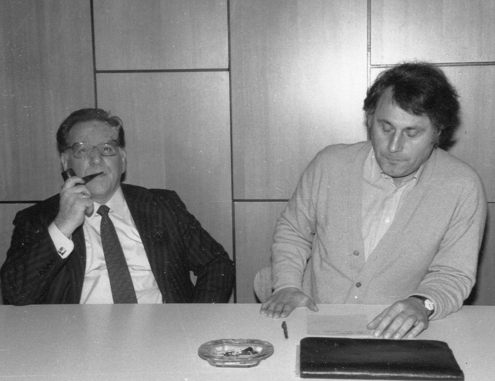 Innerparteiliche Gegenkandidatur Eugen Glombig (links) und Freimut Duve im Kurt-Schumacher-Haus in Hamburg. Es ging um die Aufstellung als SPD-Kandidat für die nächsten Bundestagswahl. Duve gewann mit einer Stimme Mehrheit